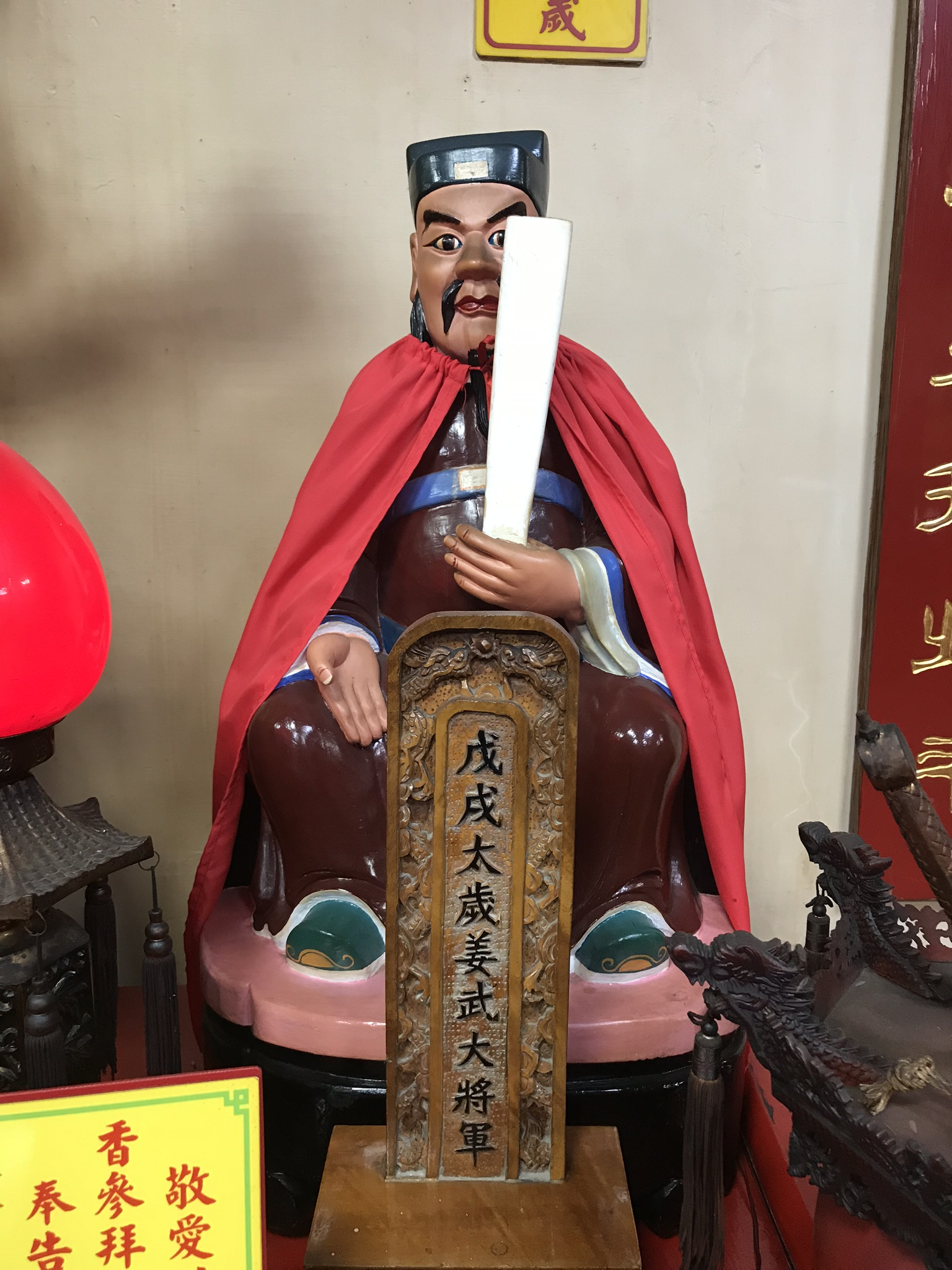 麻豆代天府戊戌太歲姜武大將軍神像